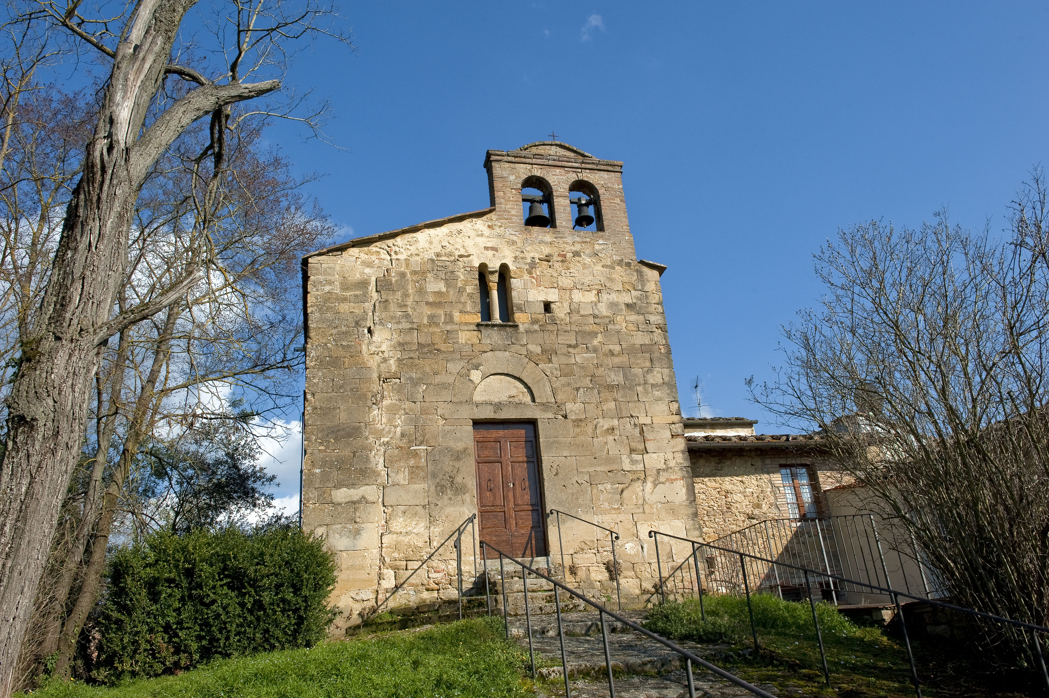 Chiesa di San Donato a Gavignano, Poggibonsi